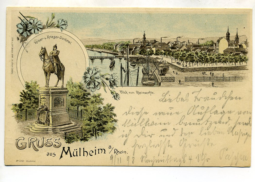 Kaiser U. Krieger Denkmal -Blick vom Rheinwerfte